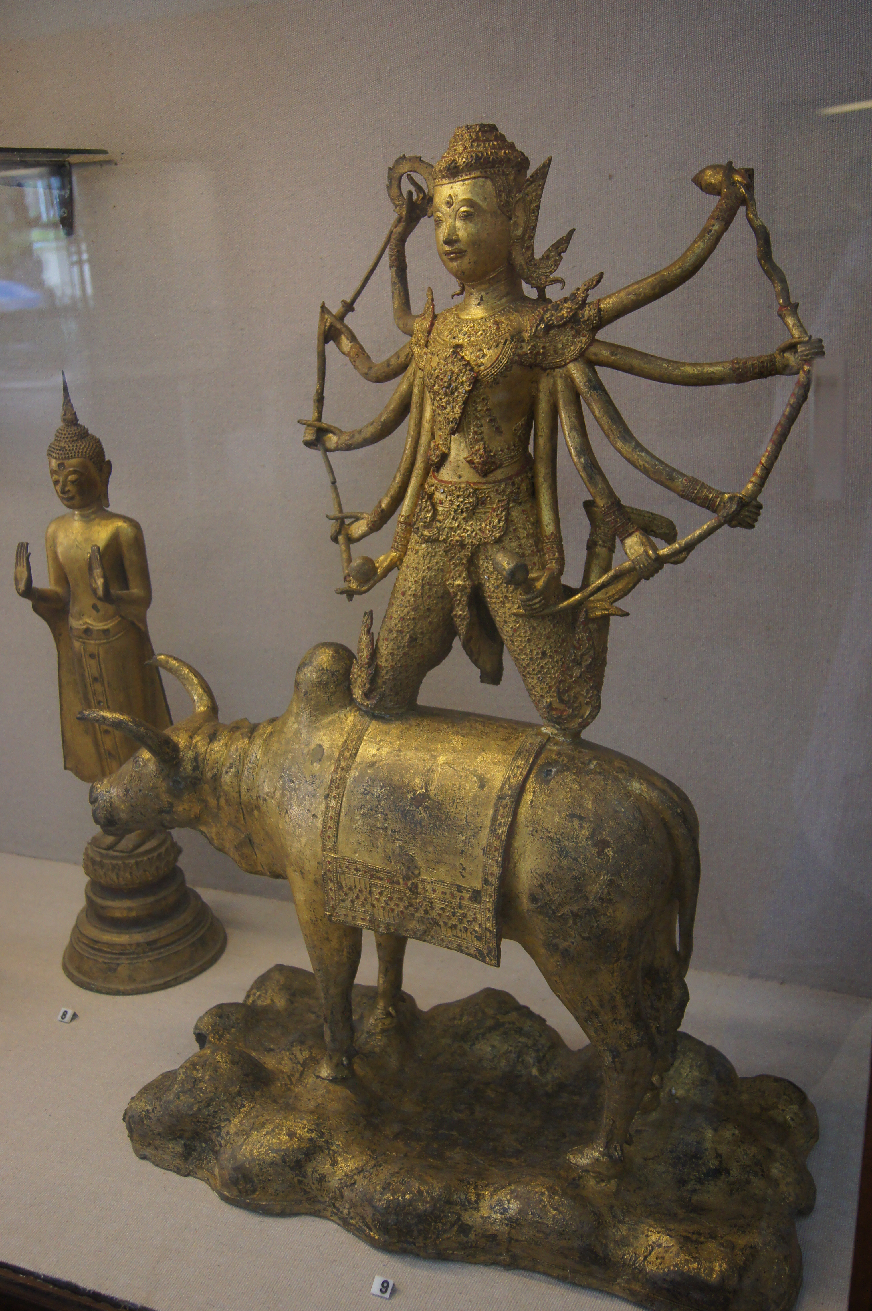 Tượng Shiva đứng trên bò Nandin bằng đồng thếp vàng và đá màu thế kỷ 19 của Thái Lan trong triễn lãm các cổ vật Đông Nam Á tại Bảo tàng lịch sử.